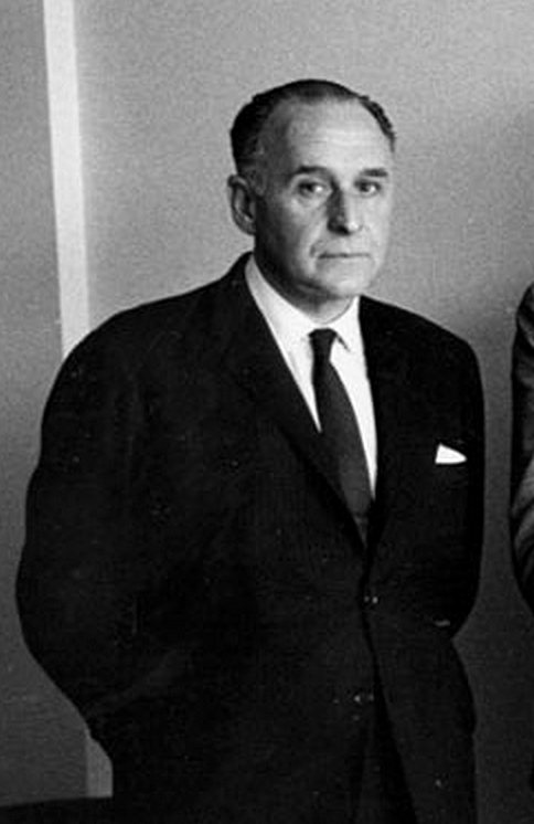 El músico uruguayo Lauro Ayestarán, Buenos Aires, 1962